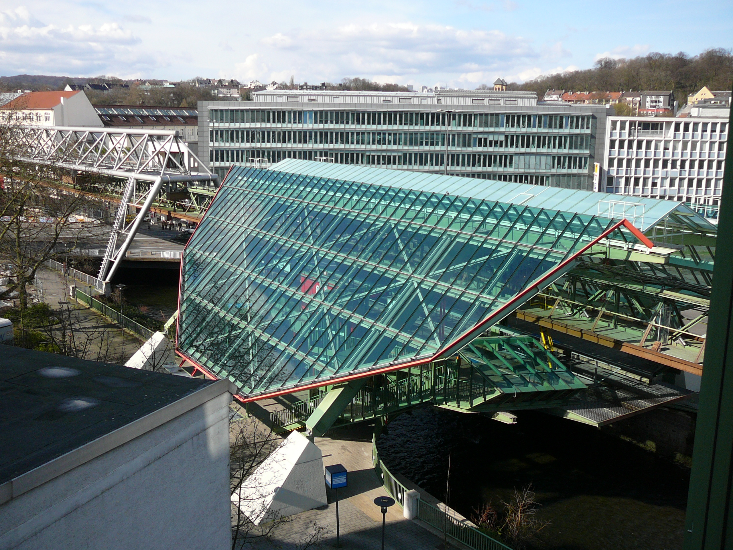 Döppersberg, Wuppertal